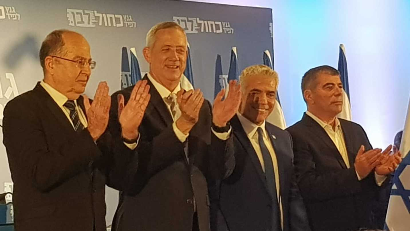 מסיבת עיתונאים, מפלגת כחול לבן, בוגי יעלון וגבי אשכנזי, יאיר לפיד ובני גנץ